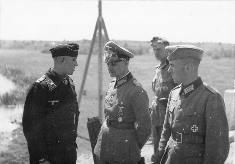 Scherl: Der Divisionskommandeur Generalleutnant Model spricht mit dem Chef der Panzer-Spitzenkompanie, Ritterkreuzträger Oberleutnant Buchterkirch, über den weiteren Angriff. Aufnahme: Kriegsberichter Fritz Lucke, Berichterkompanie des Ob.d.H. 6106-42